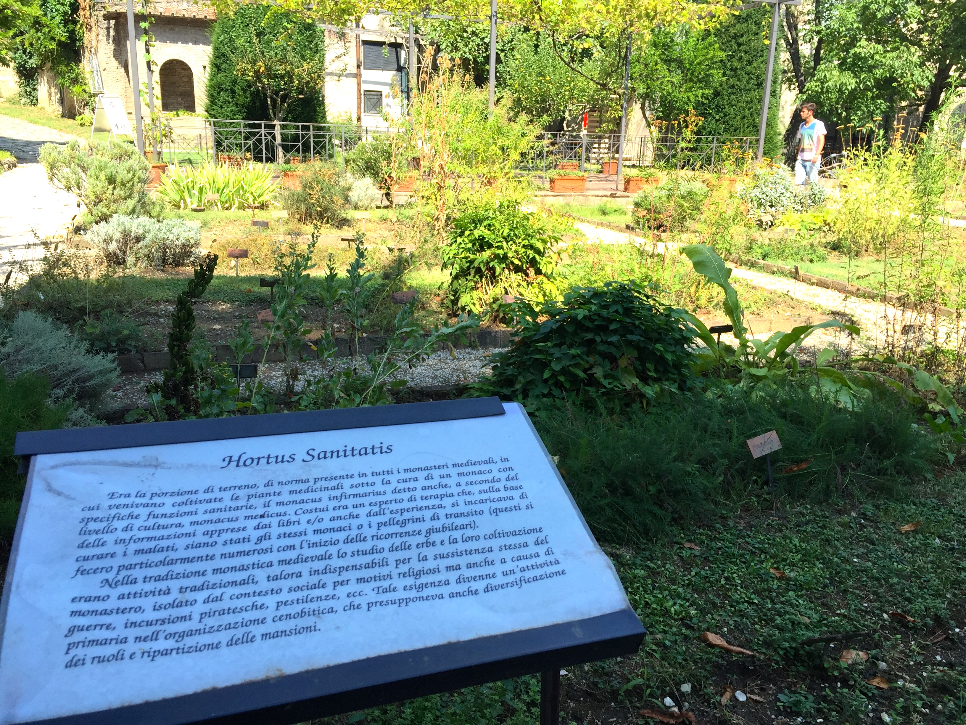 angolo dell'orto botanico